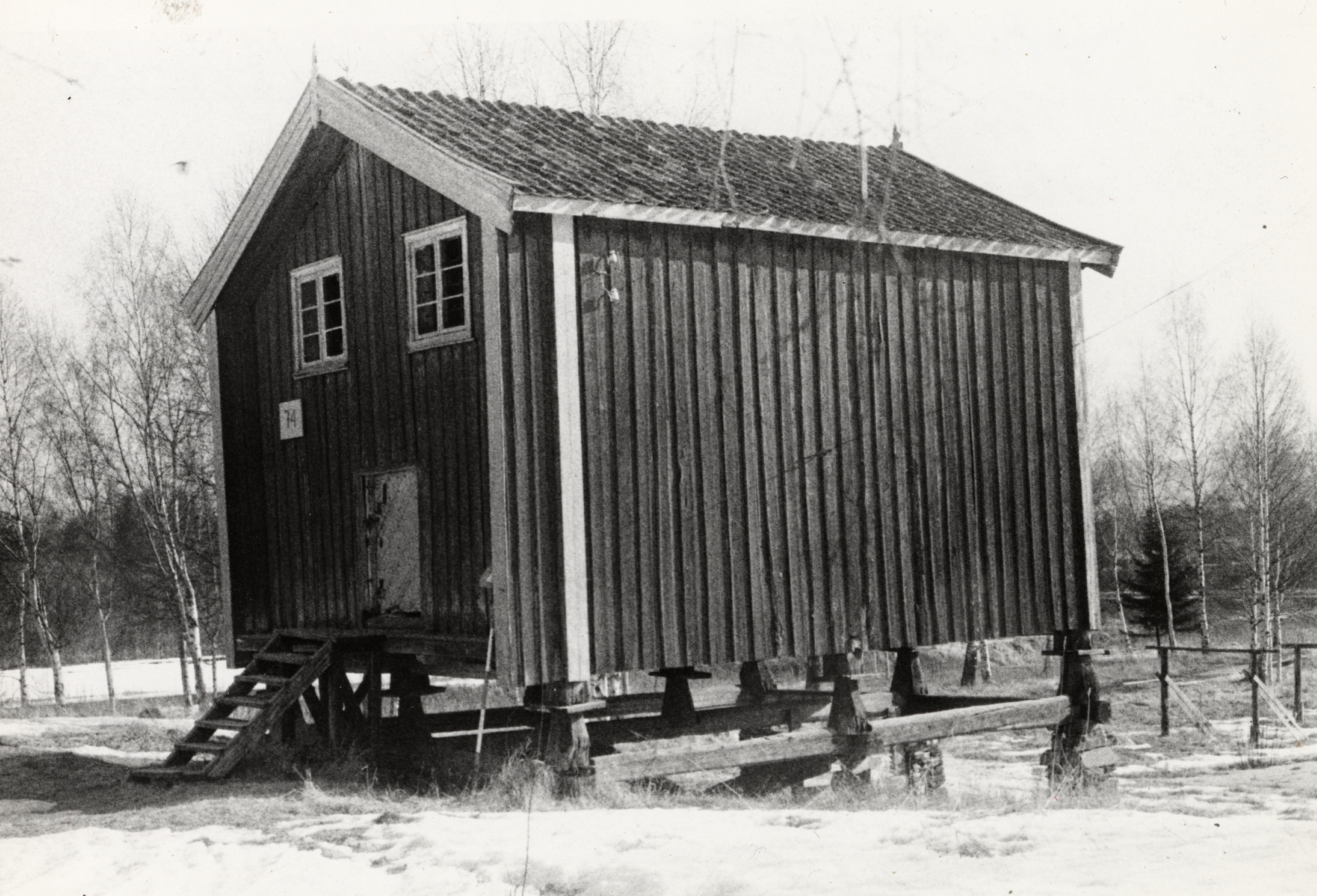 Helgelandsmoen i Hole, Buskerud Flyttet fra Tanbergmoen i 1869